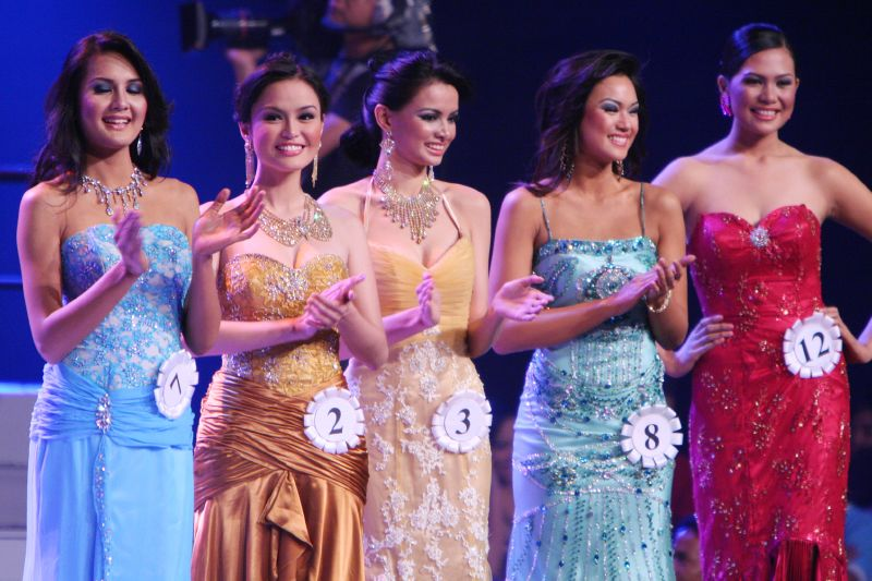 Evening Gown of Binibining Pilipinas 2008